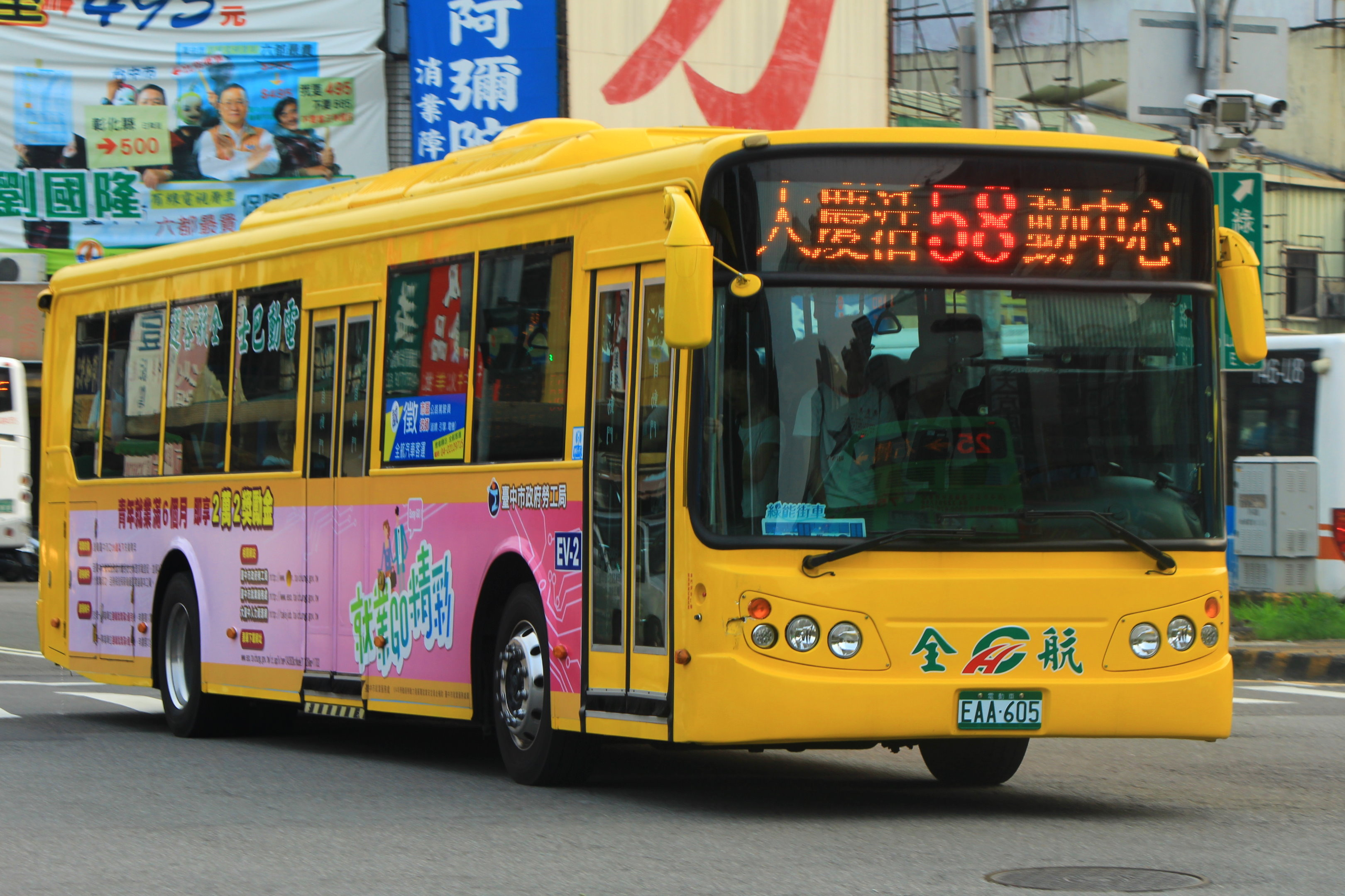 電動車跑58